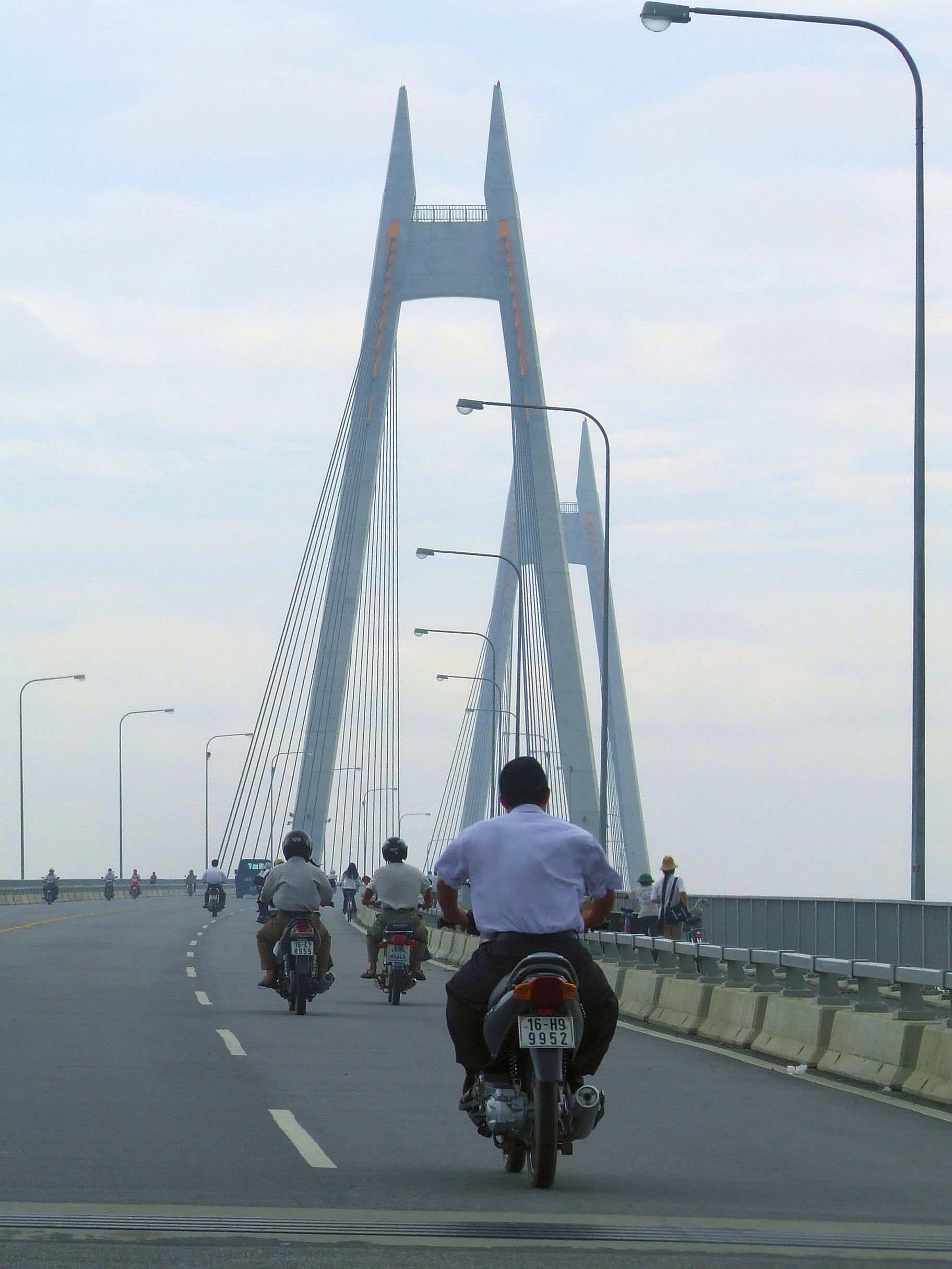 Binh Bridge, Haiphong.